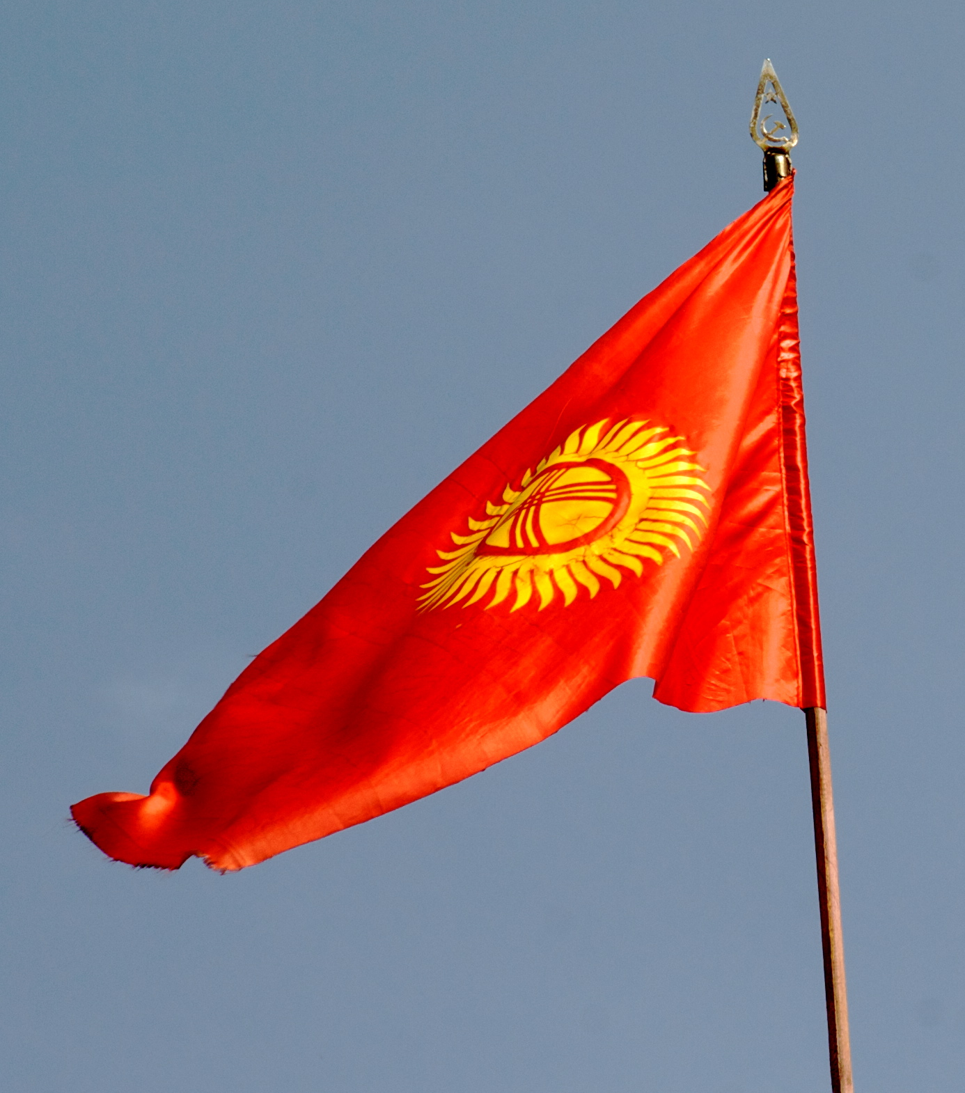 Wehende kirgisische Flagge in Osch.